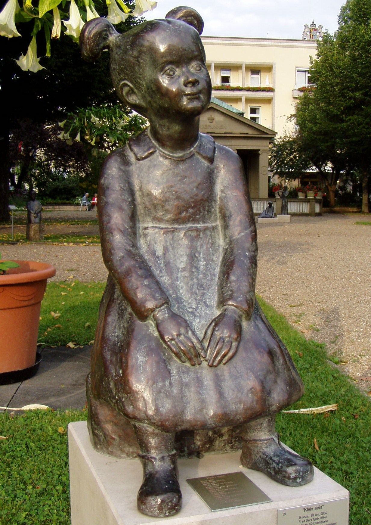 „Klein sein/Being small“ (2004, Bronze, 68 cm) by Fred Gerz (*1944)